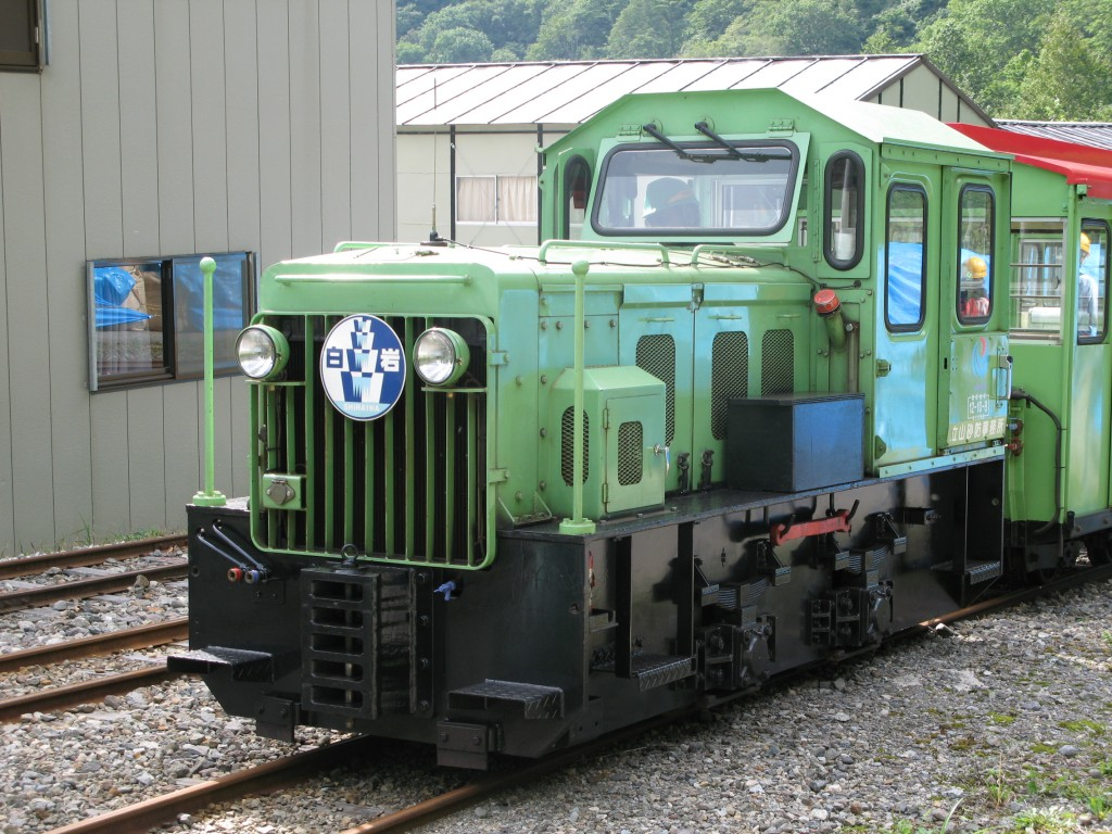 立山砂防軌道のディーゼル機関車。2007年9月12日、水谷連絡所で投稿者が撮影。